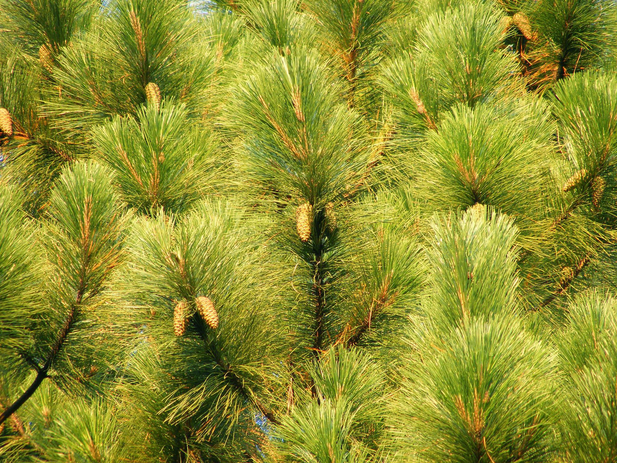 Pinus elliottii foliage and immature cones, Georgia, USA